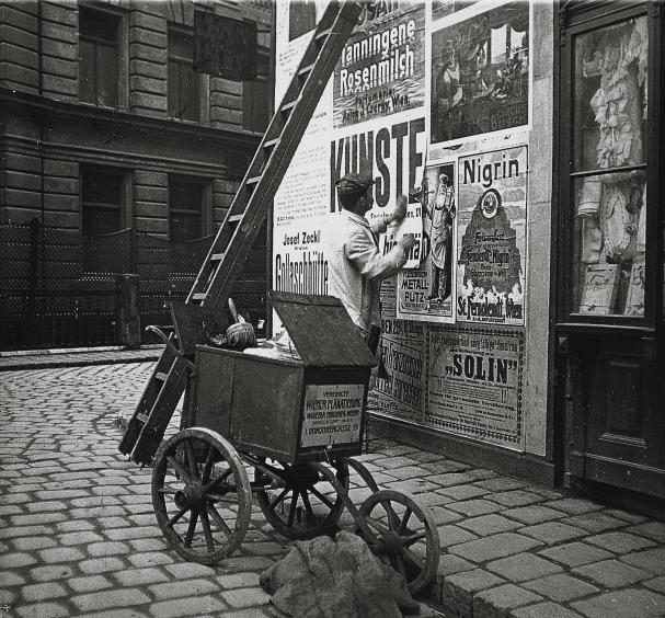 Plakatankleber in Wien